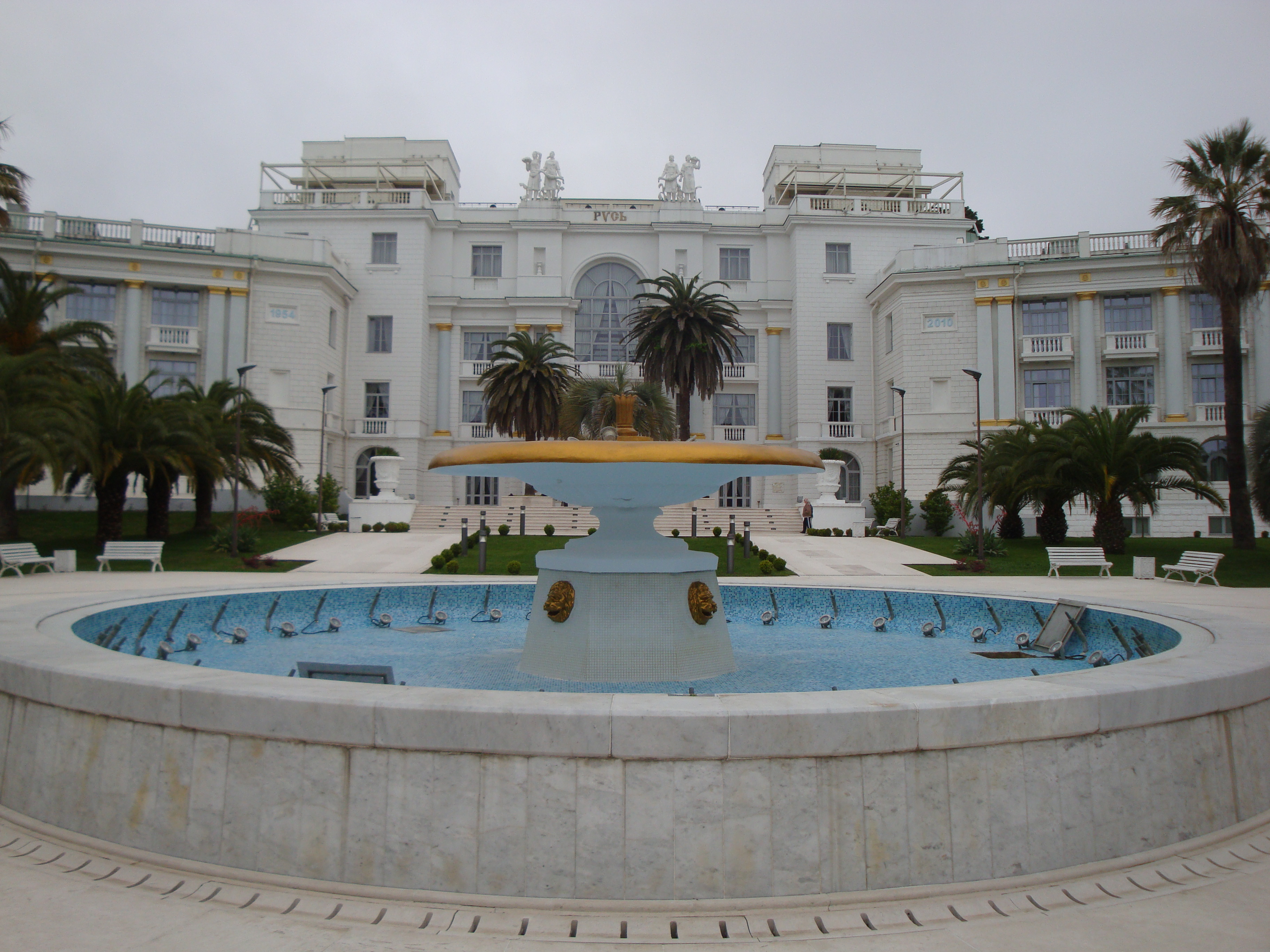 Санаторий «Русь», главный корпус: улица Политехническая, 22, Центральный район, Сочи, Краснодарский край